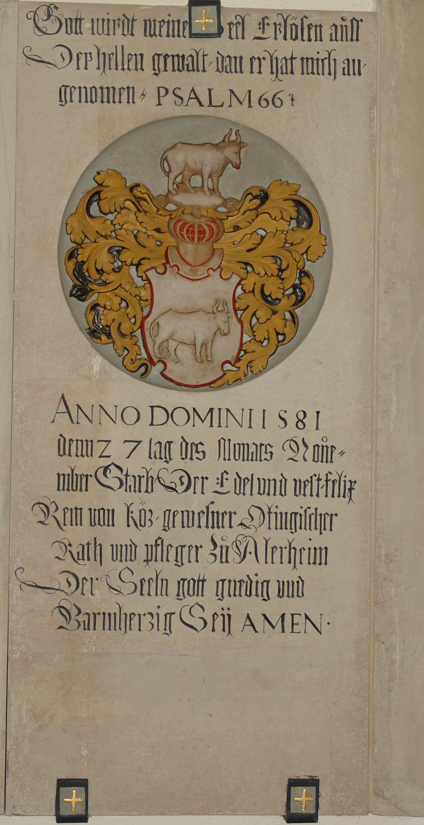 Evangelisch-lutherische Pfarrkirche St. Stephanus in Alerheim, Epitaph für Felix Rem von Kötz, Oettingischer Rat und Pfleger zu Alerheim, gestorben am 27. November 1581 (siehe Georg Lill (Hrsg.), Karl Gröber/Adam Horn (Bearb.): Die Kunstdenkmäler von Bayern. Bezirksamt Nördlingen. In: Die Kunstdenkmäler von Bayern. Die Kunstdenkmäler von Schwaben. Bd. I. Bezirksamt Nördlingen. R. Oldenbourg Verlag, München 1938, (Nachdruck: R. Oldenbourg Verlag, München/Wien 1982, ISBN 3-486-50514-9), S. 26)